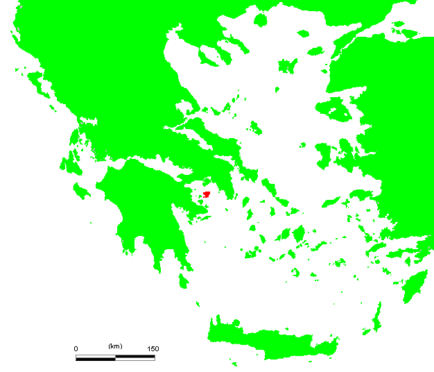 GR Aegina.PNG (Greek island)